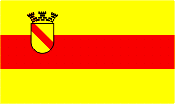 Stadsvlag van Baden-Baden